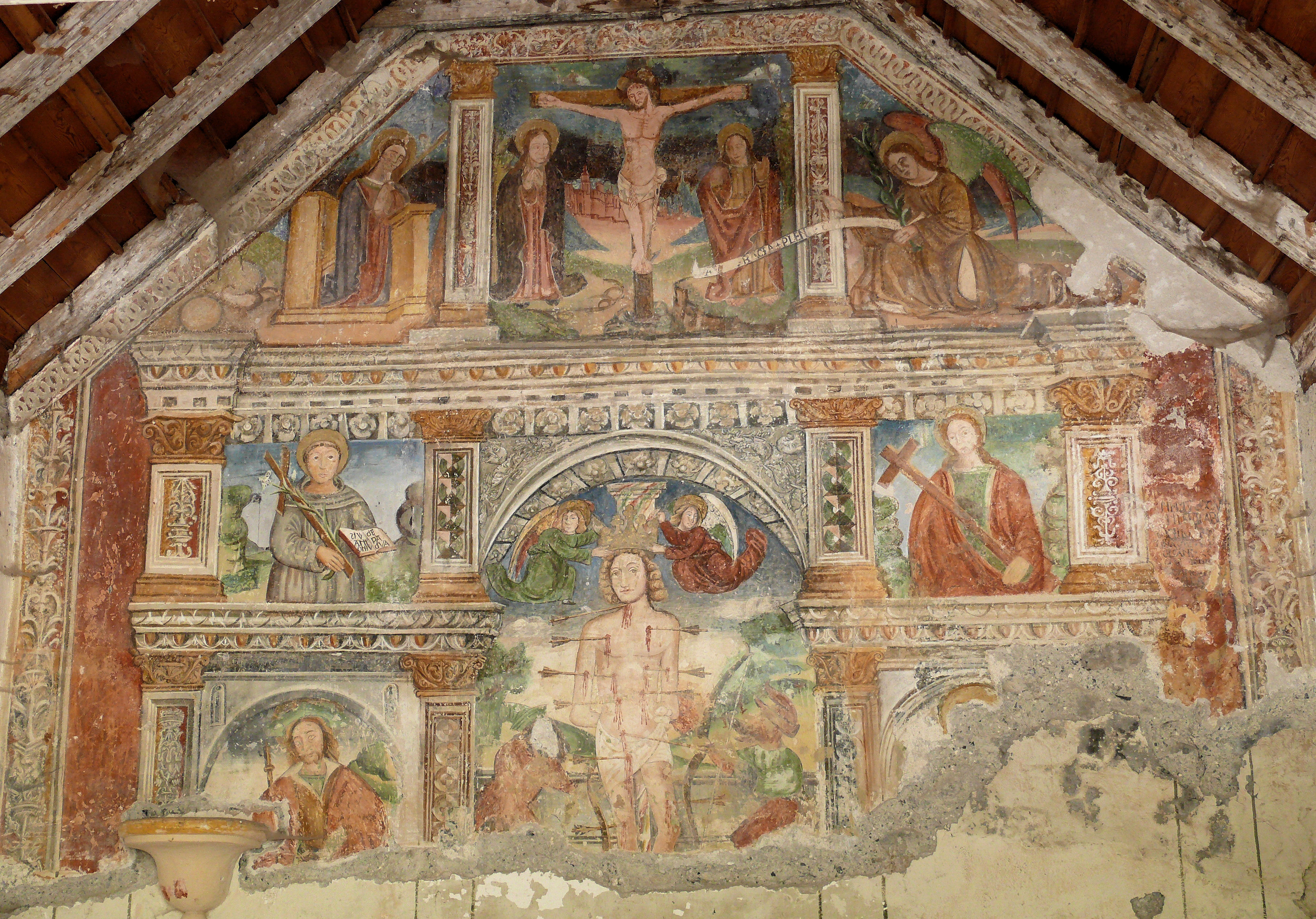 Entraunes - Chapelle Saint-Sébastien - Fresque peinte en 1516 par Andrea de Cella